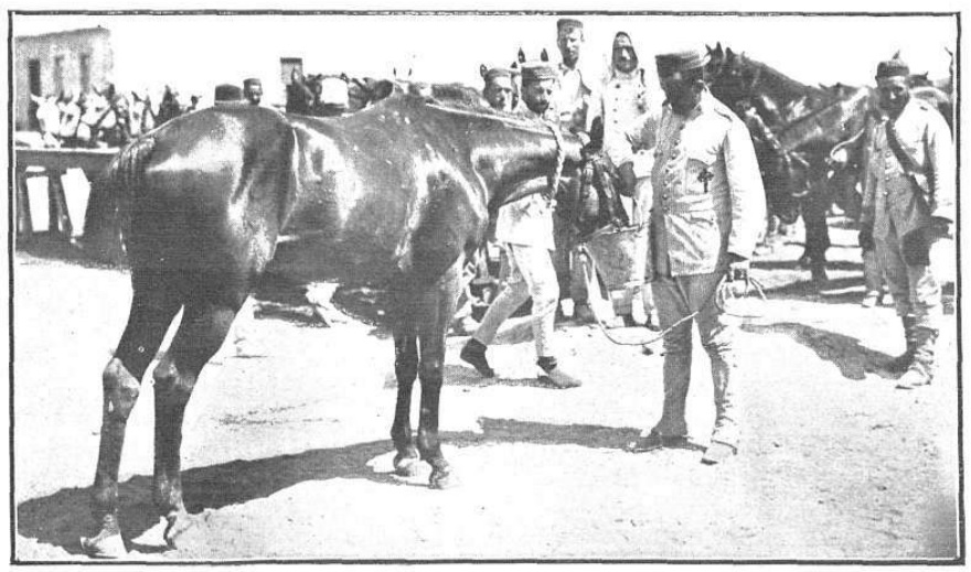 D. Jaime Quiroga, hijo de la condesa de Pardo Bazán, soldado voluntario de Húsares de la Princesa, dando agua á su caballo